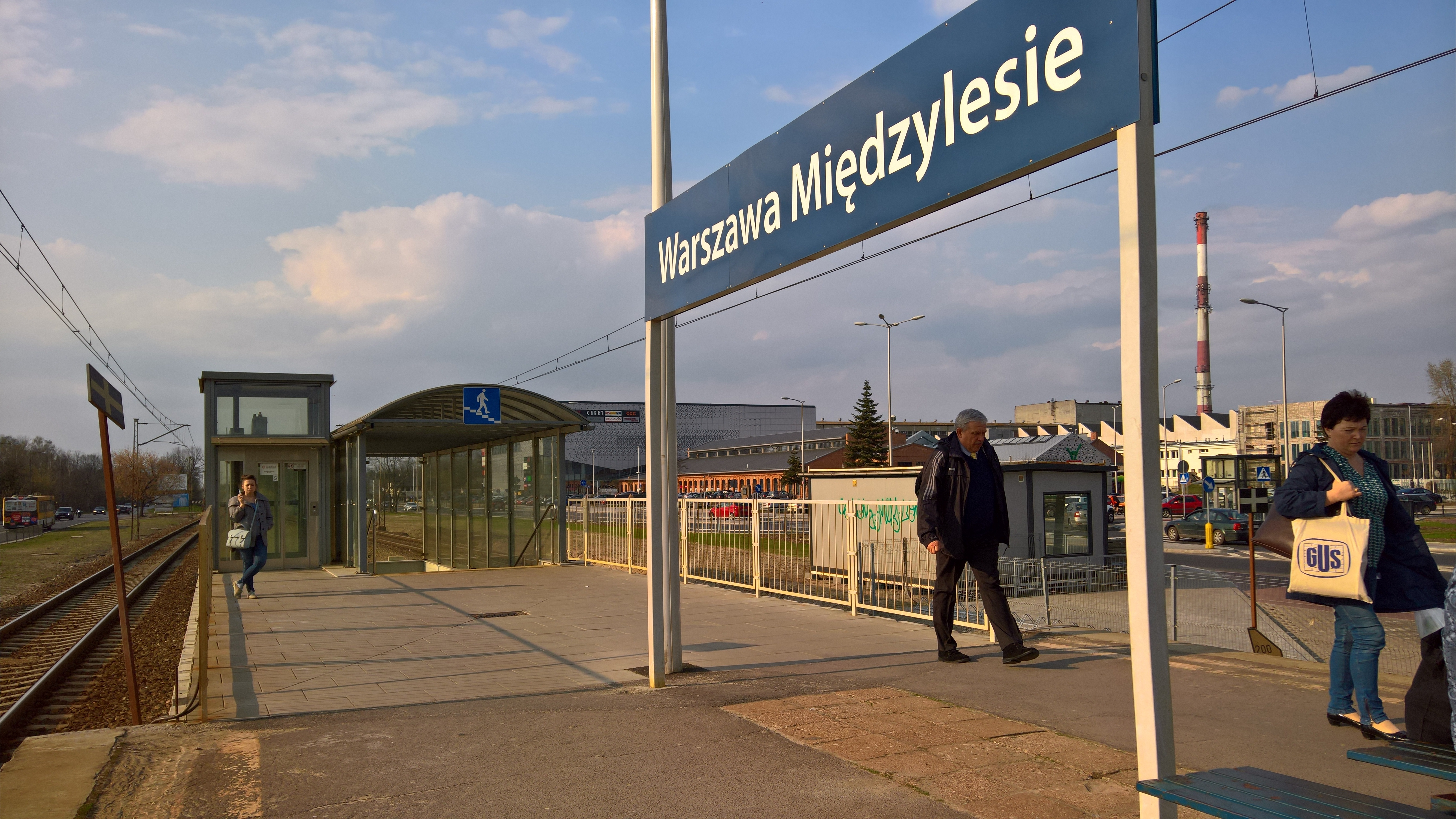 Przejście podziemne PKP Międzylesie (Warszawa)